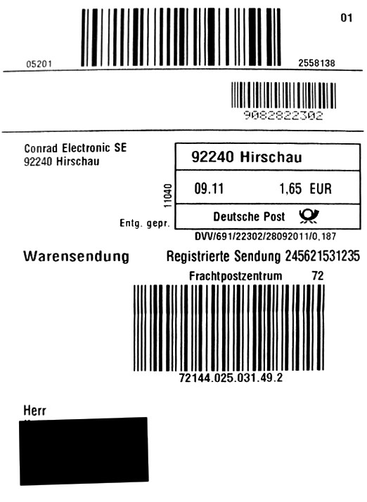 DHL Warensendung